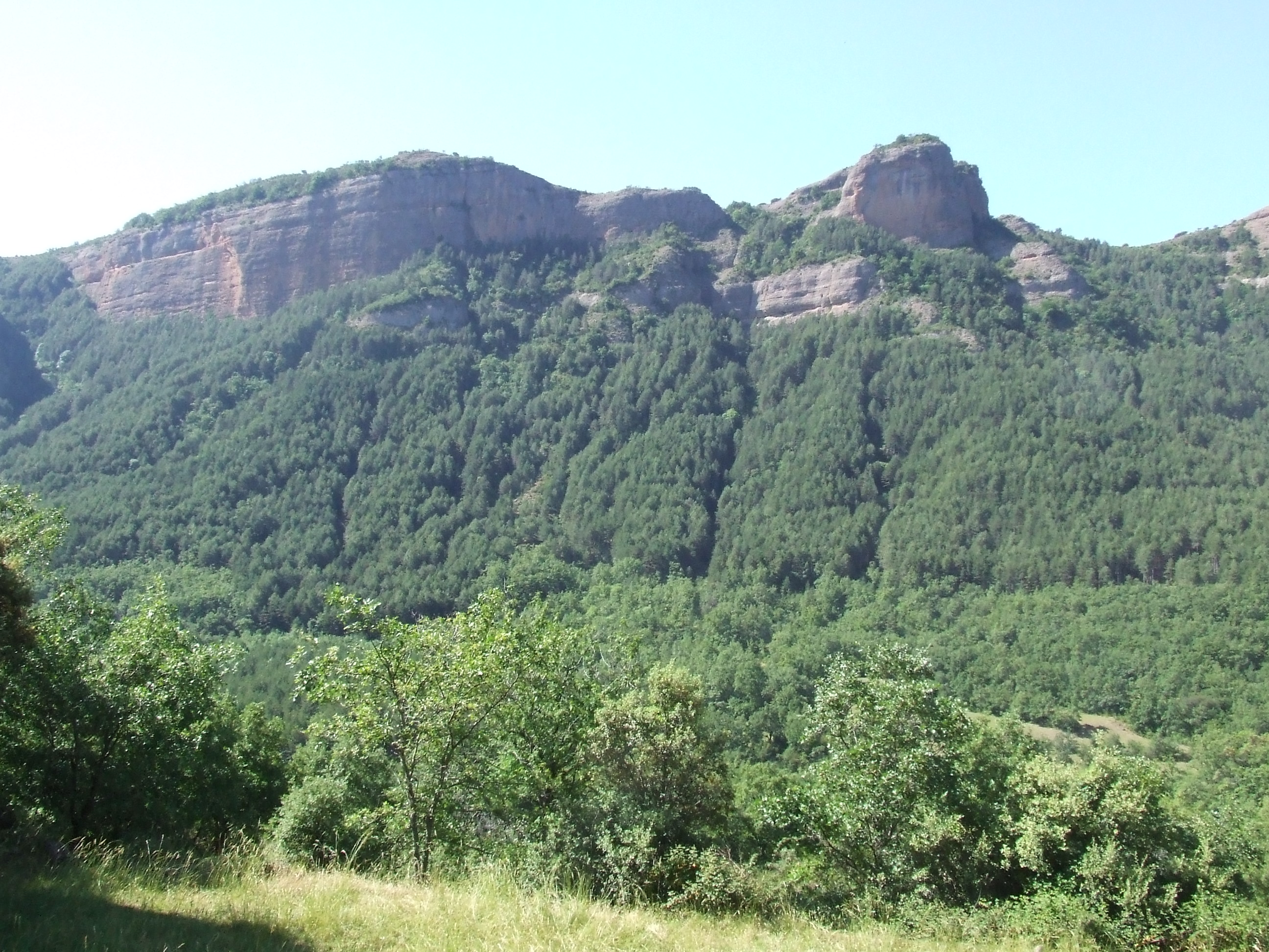 El Tossal del Càvet (Serradell, Toralla i Serradell, Conca de Dalt, Pallars Jussà)